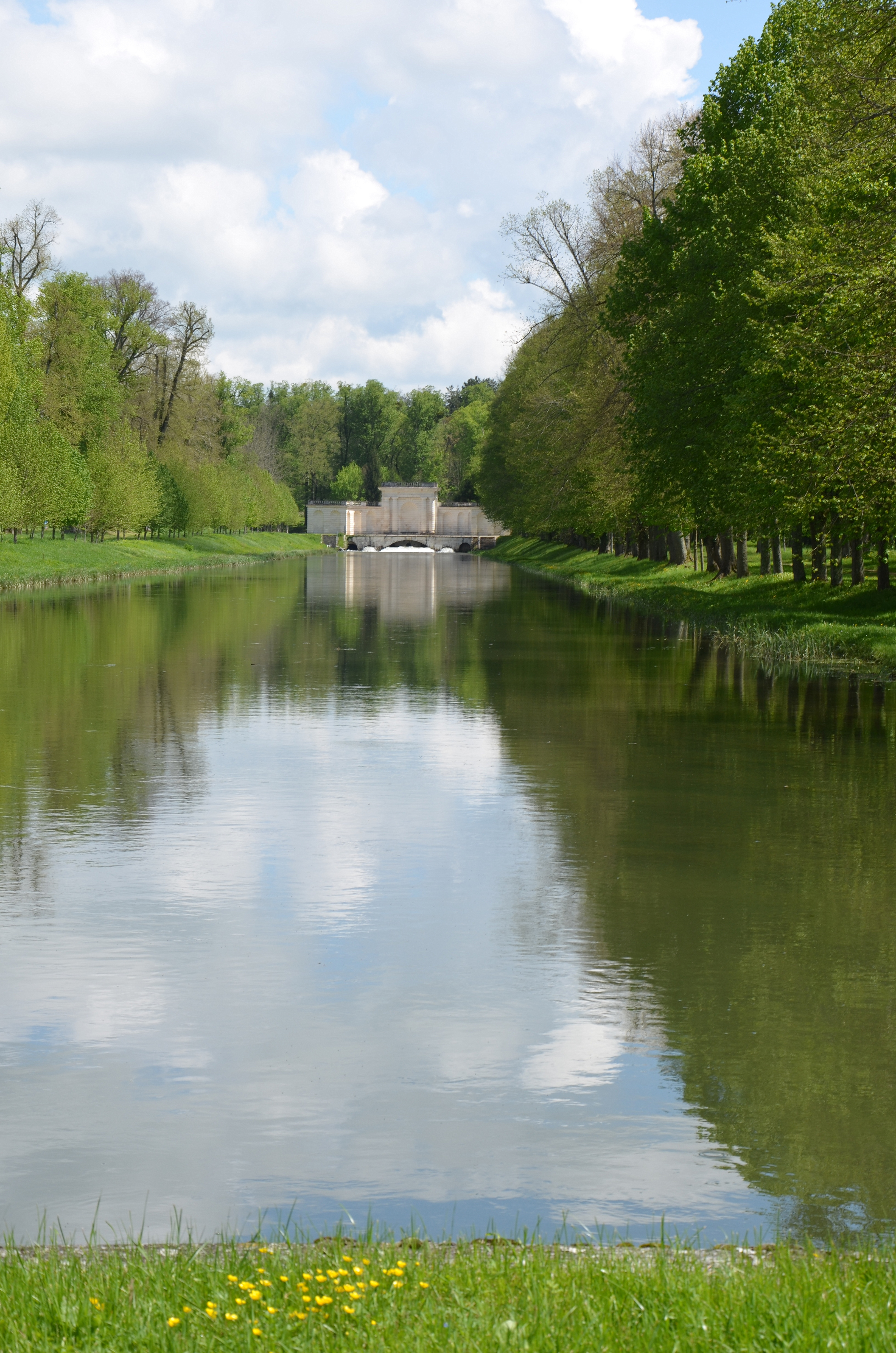 Château de Tanlay, Yonne, France